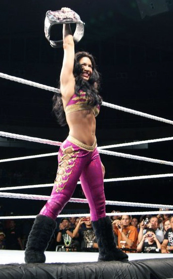 Melina